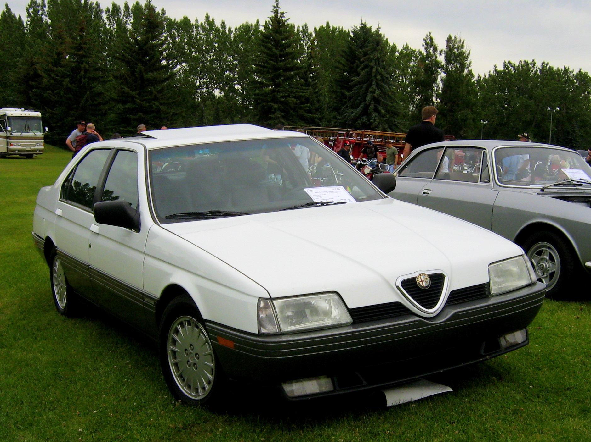 Alfa Romeo 164